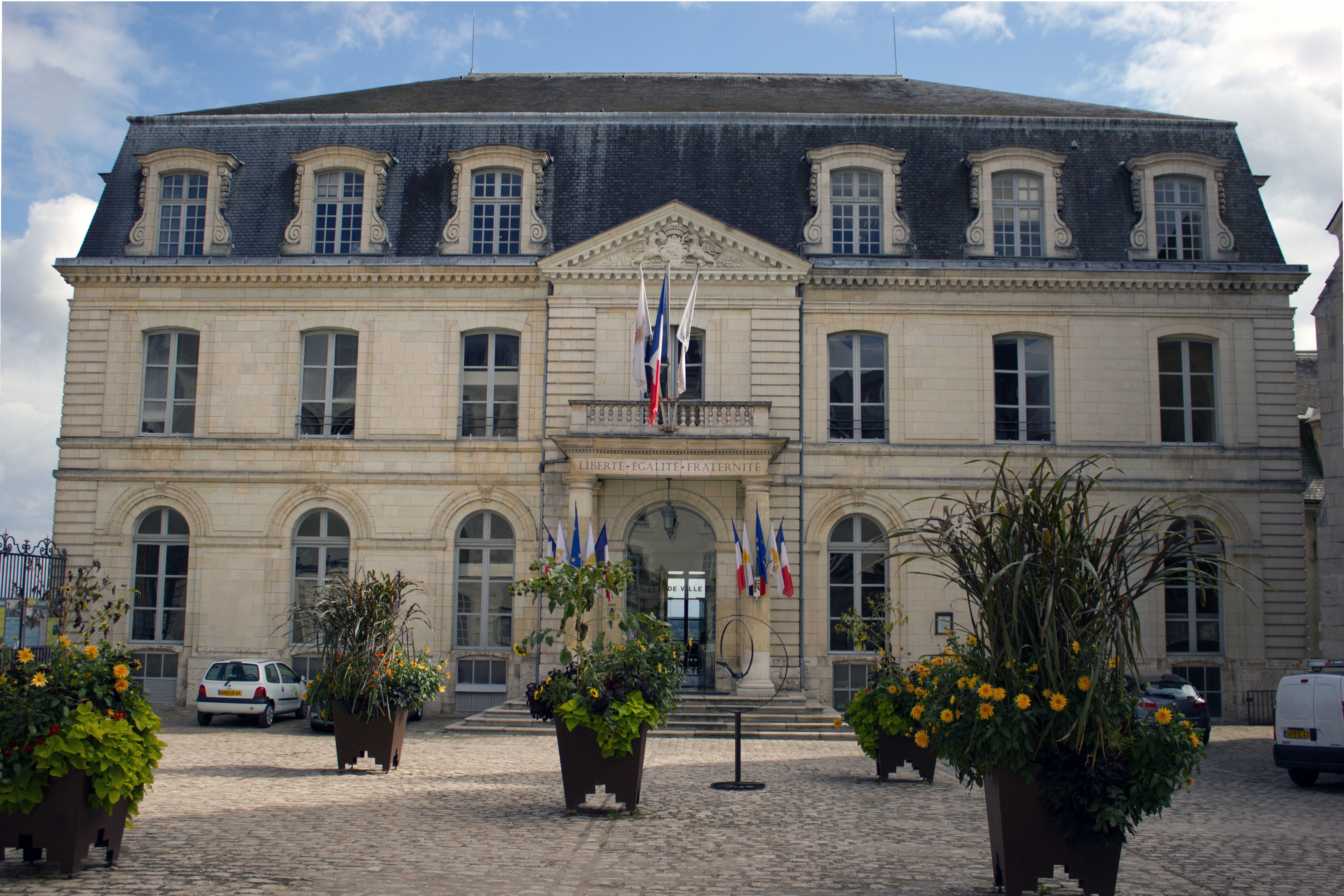 Hotel de ville à Blois. .